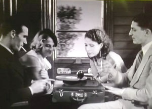 Una scena di "Treno popolare" (Matarazzo, 1933)